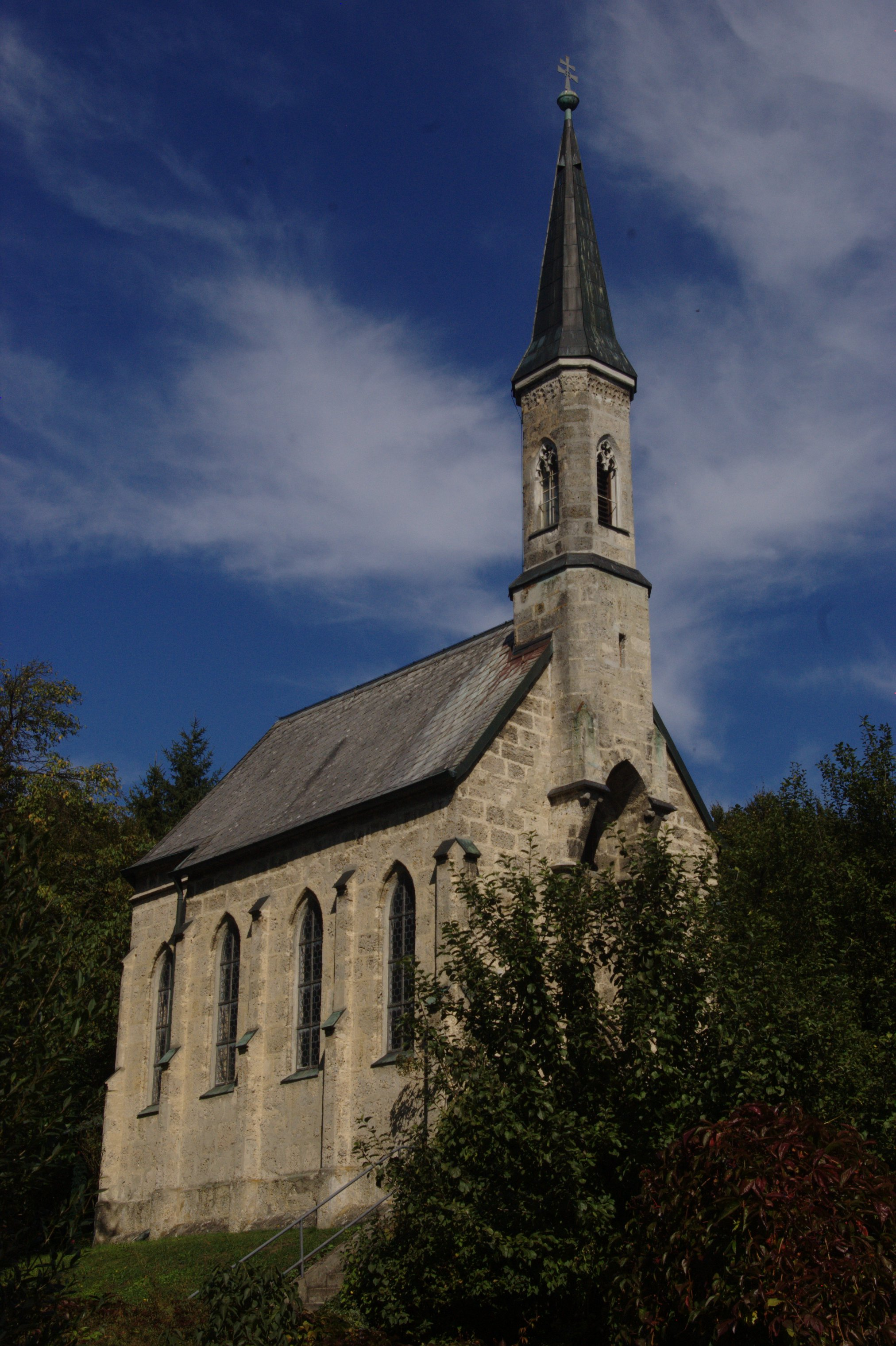 Kümmerniskapelle AußenansichtThis is a photograph of an architectural monument.